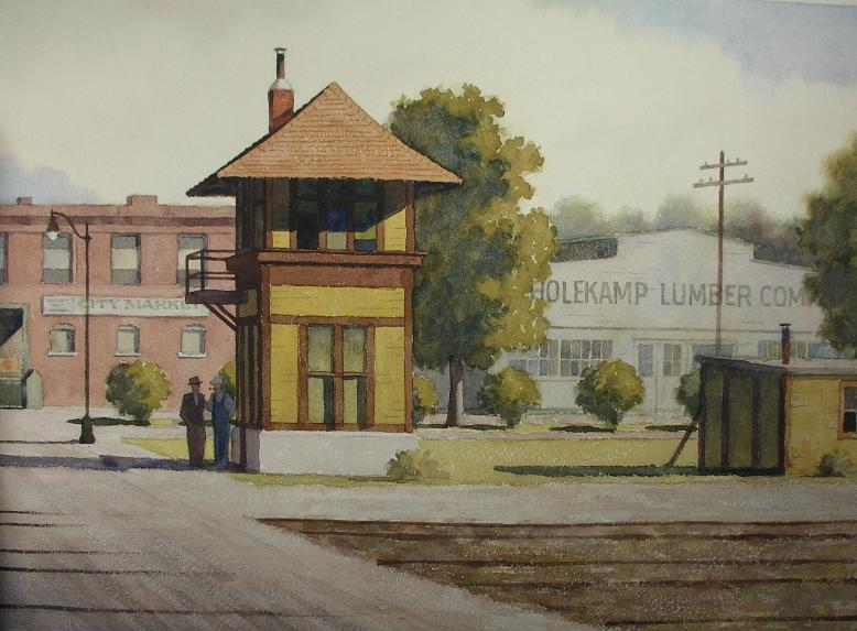 Holekamp Lumber